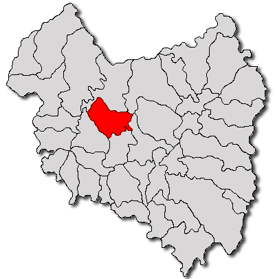 Categorie:Hărţi ale judeţului Covasna